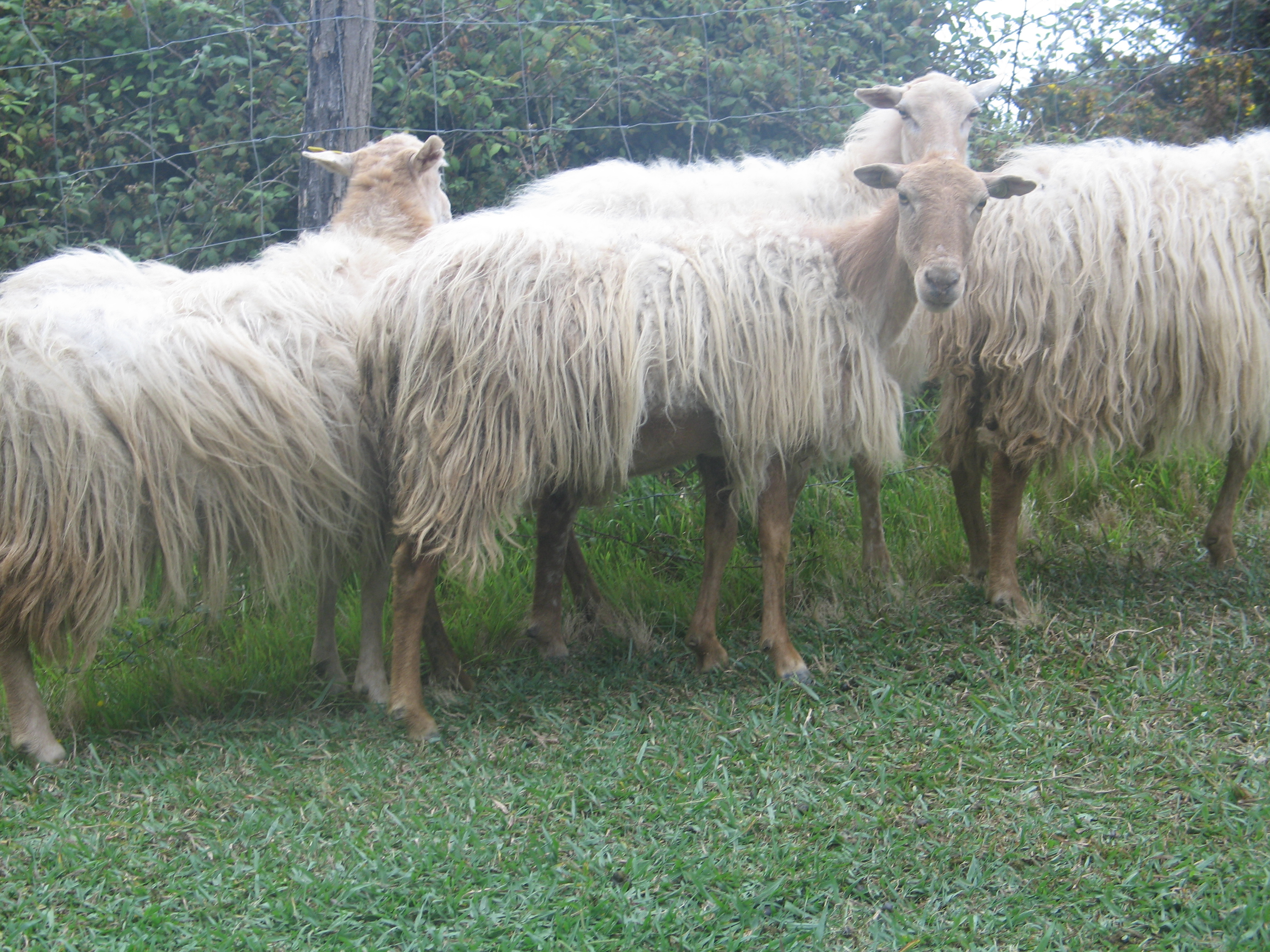 Sasardien taldea Punta Mendatan.